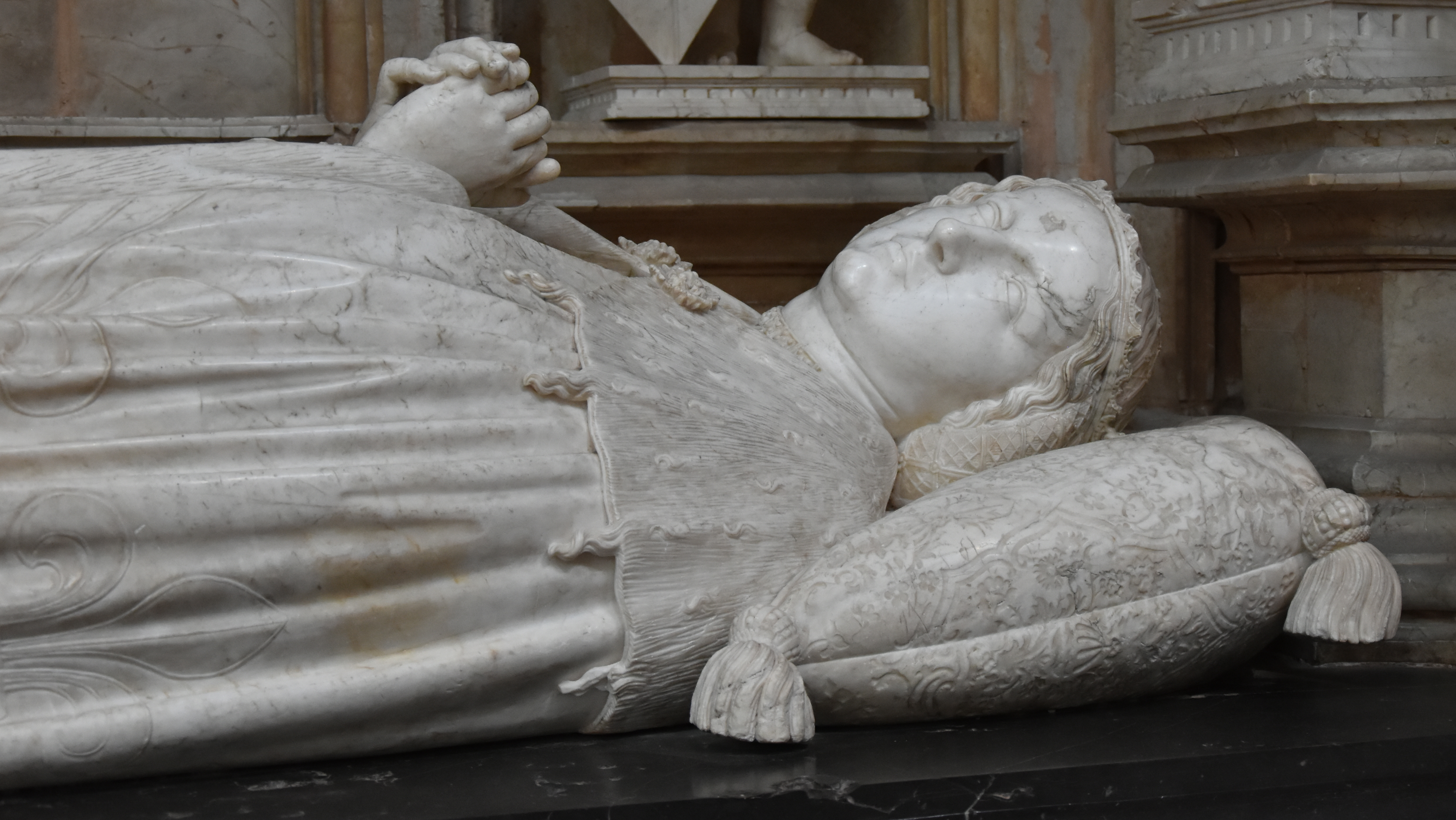 Detail van het Margaretha van Bourbon (1438-1483) - Koninklijk klooster van Brou